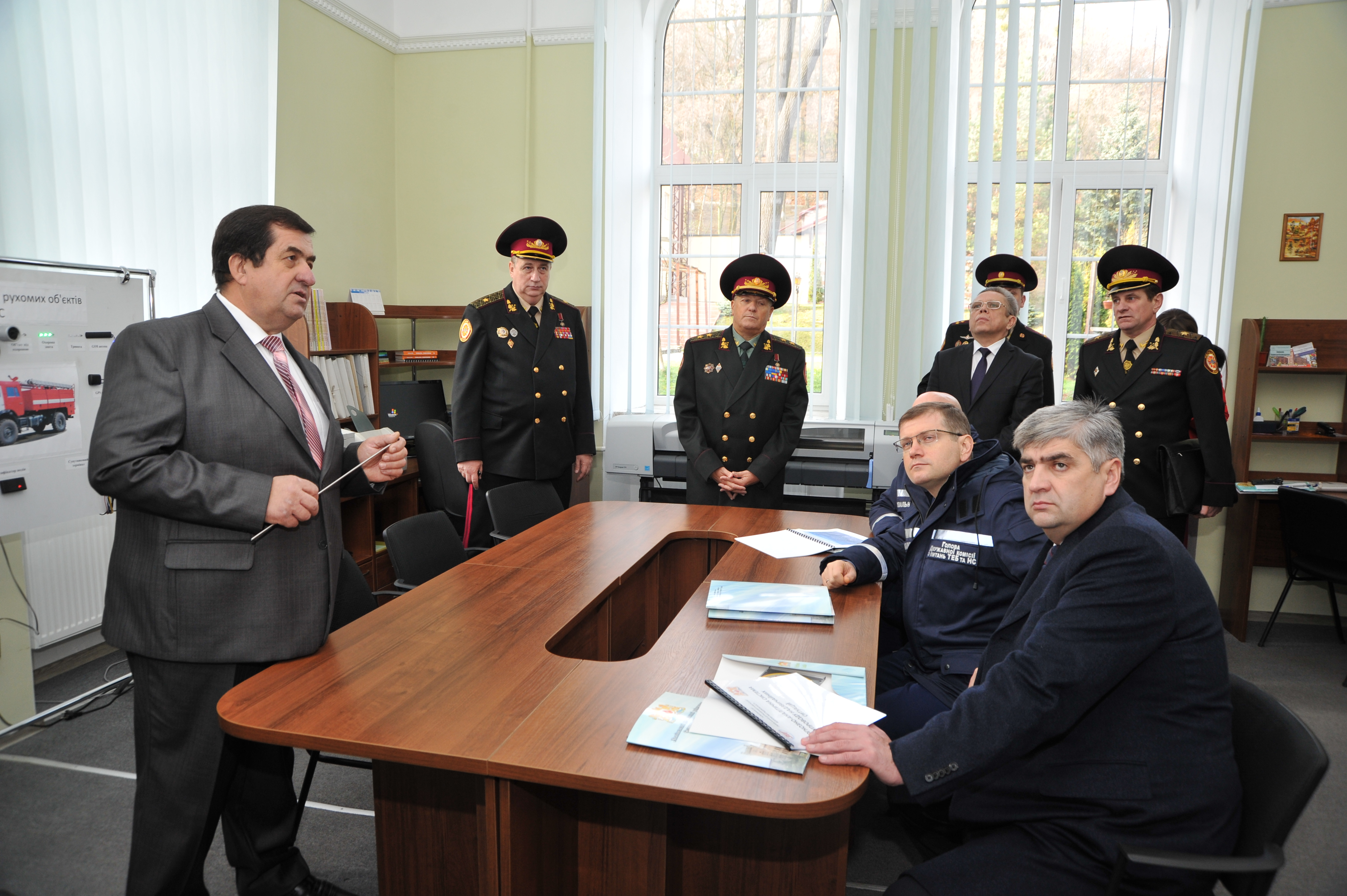 Обговорення проекту.